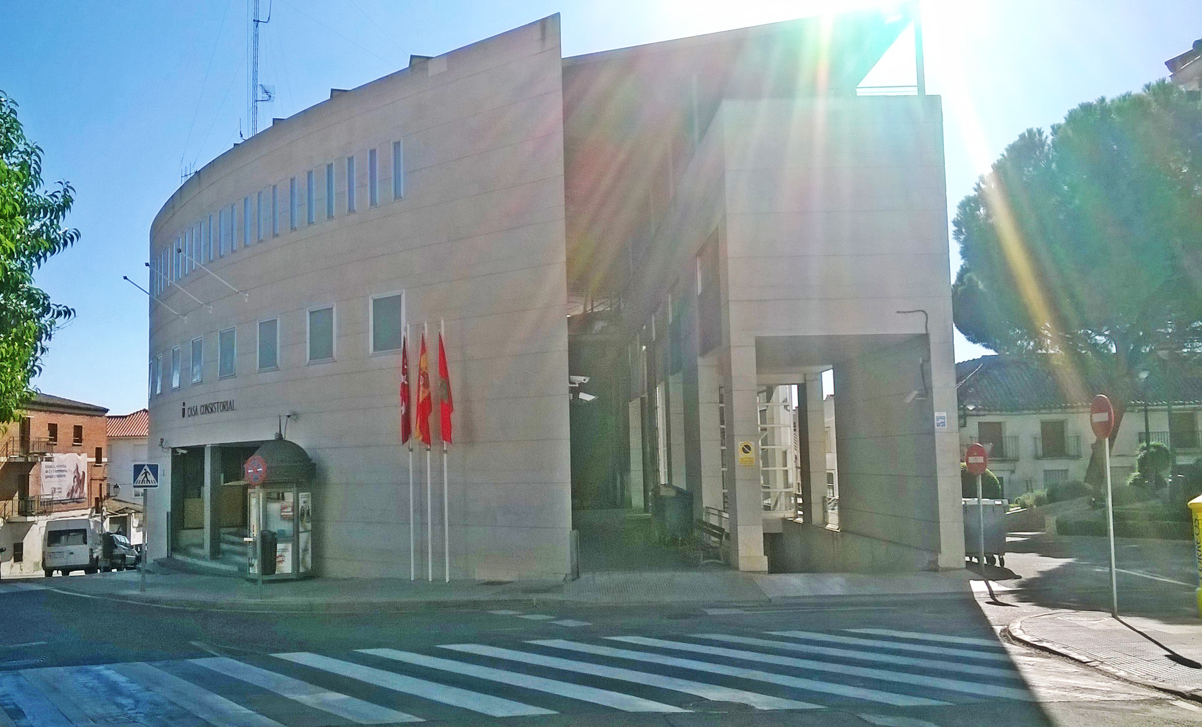 Casa Consistorial es un edificio inaugurado en 1992 , como nueva sede del ayuntamiento de Parla.